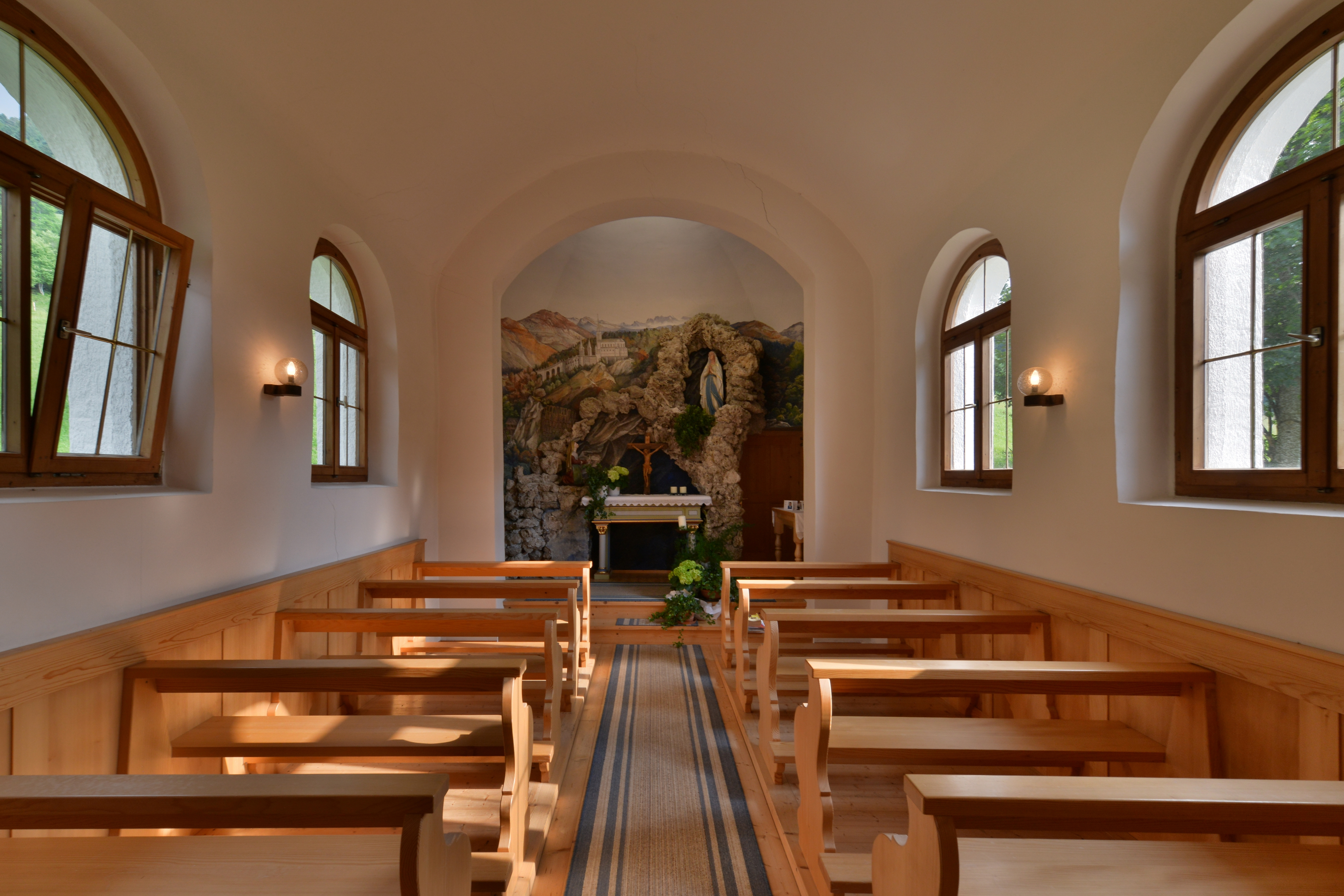 Die Lourdeskapelle Maltach ist eine kleine Kapelle im Ortsteil Maltach der Bregenzerwälder Gemeinde Schwarzenberg. Ein eingeschränkter Fahrweg führt über das Dorfzentrum von Alberschwende.